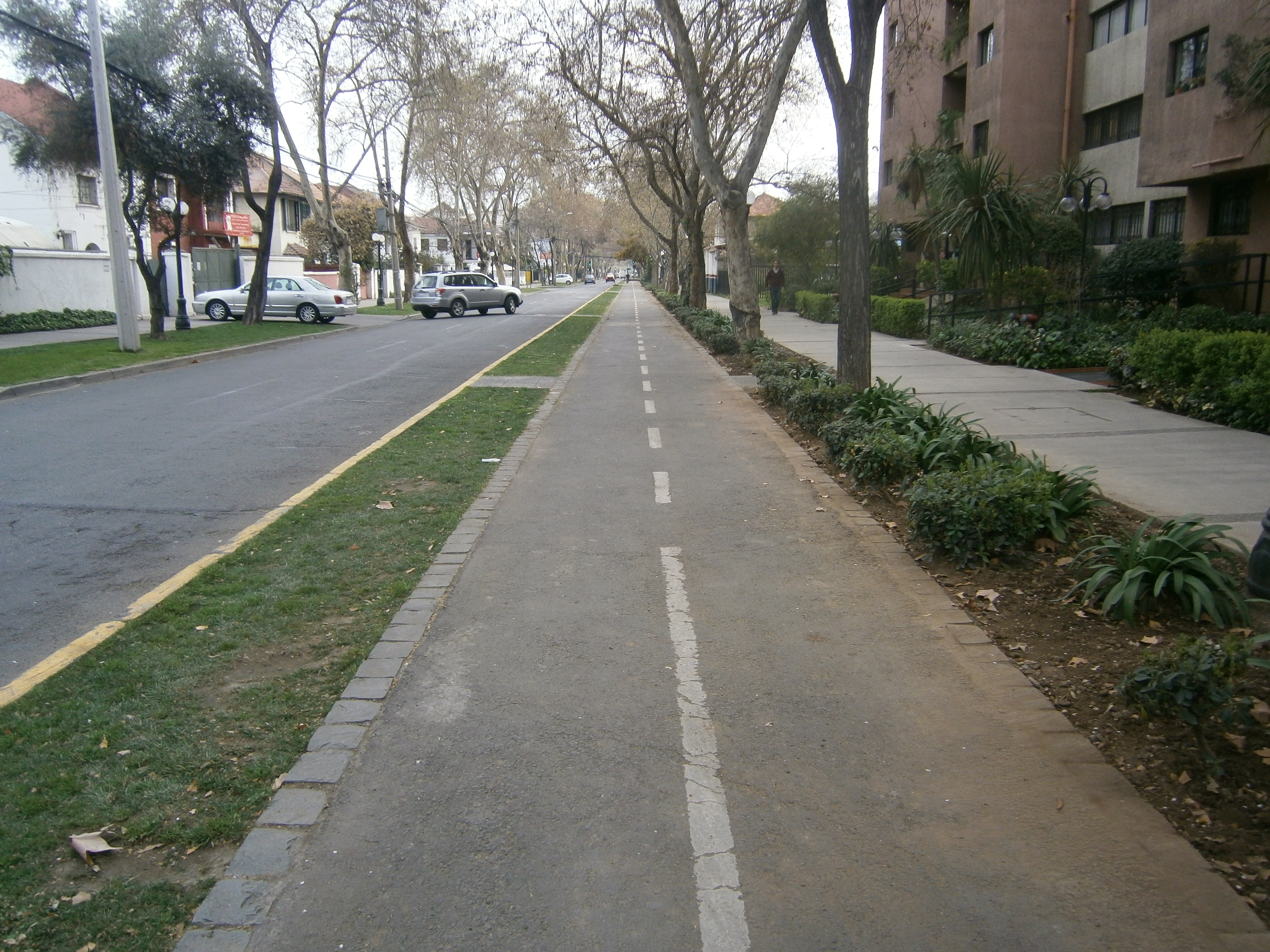 Ciclovía en calle Marín en la comuna de Providencia de Santiago de Chile.